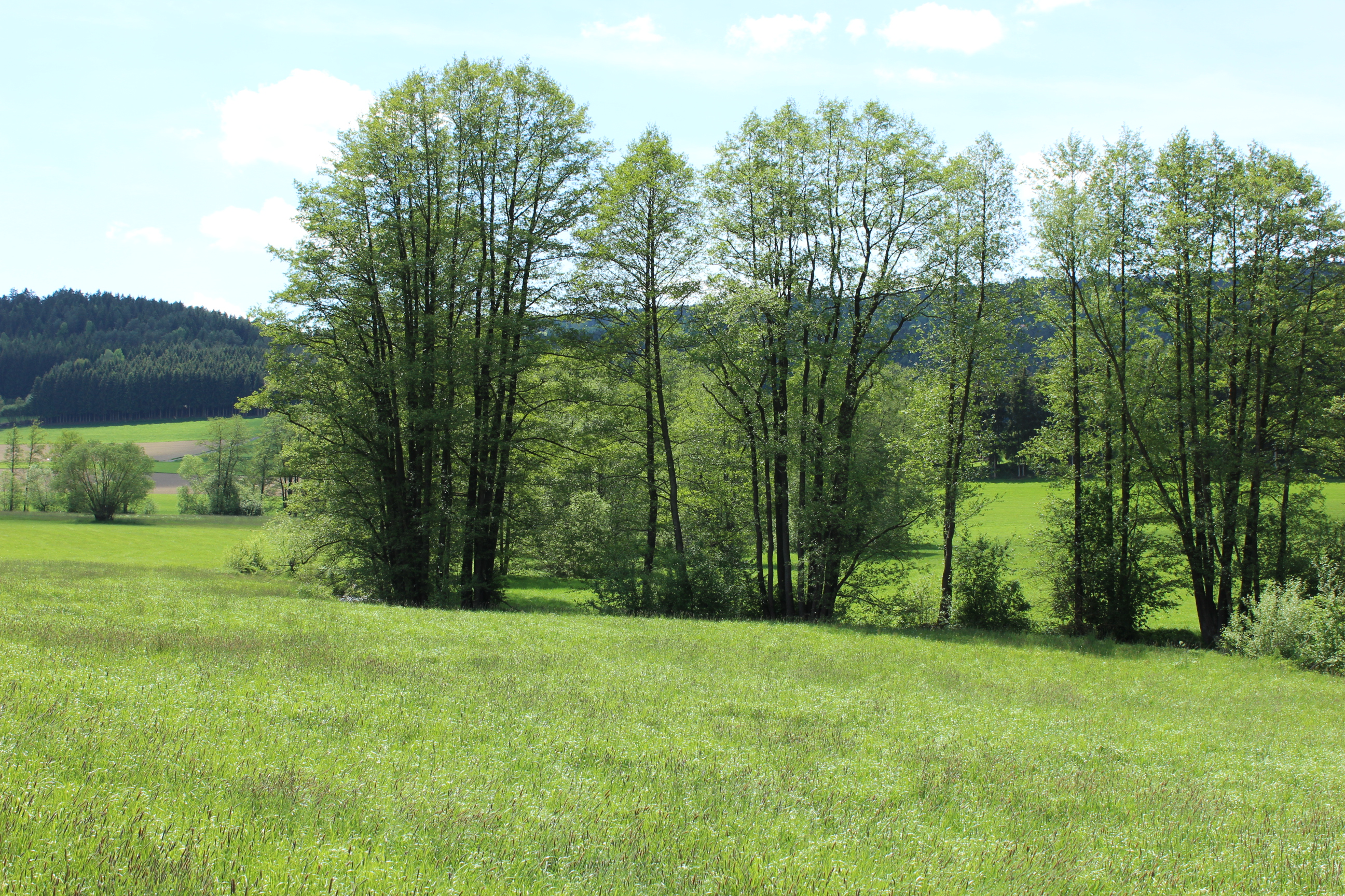 Aitnachtal südlich der Stadt Viechtach im Landkreis Regen. Geotop Nr. 276R013 im Landkreis Regen.